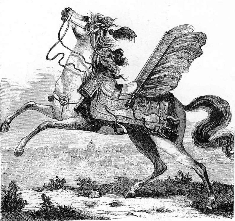 Ilustracja do Encyklopedii staropolskiej T.2 298 - koń husarski